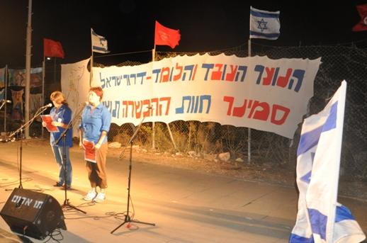 טקס סיום סמינר חוות ההכשרה התש"ע, הנוער העובד והלומד - דרור ישראל, קיבוץ רביד.